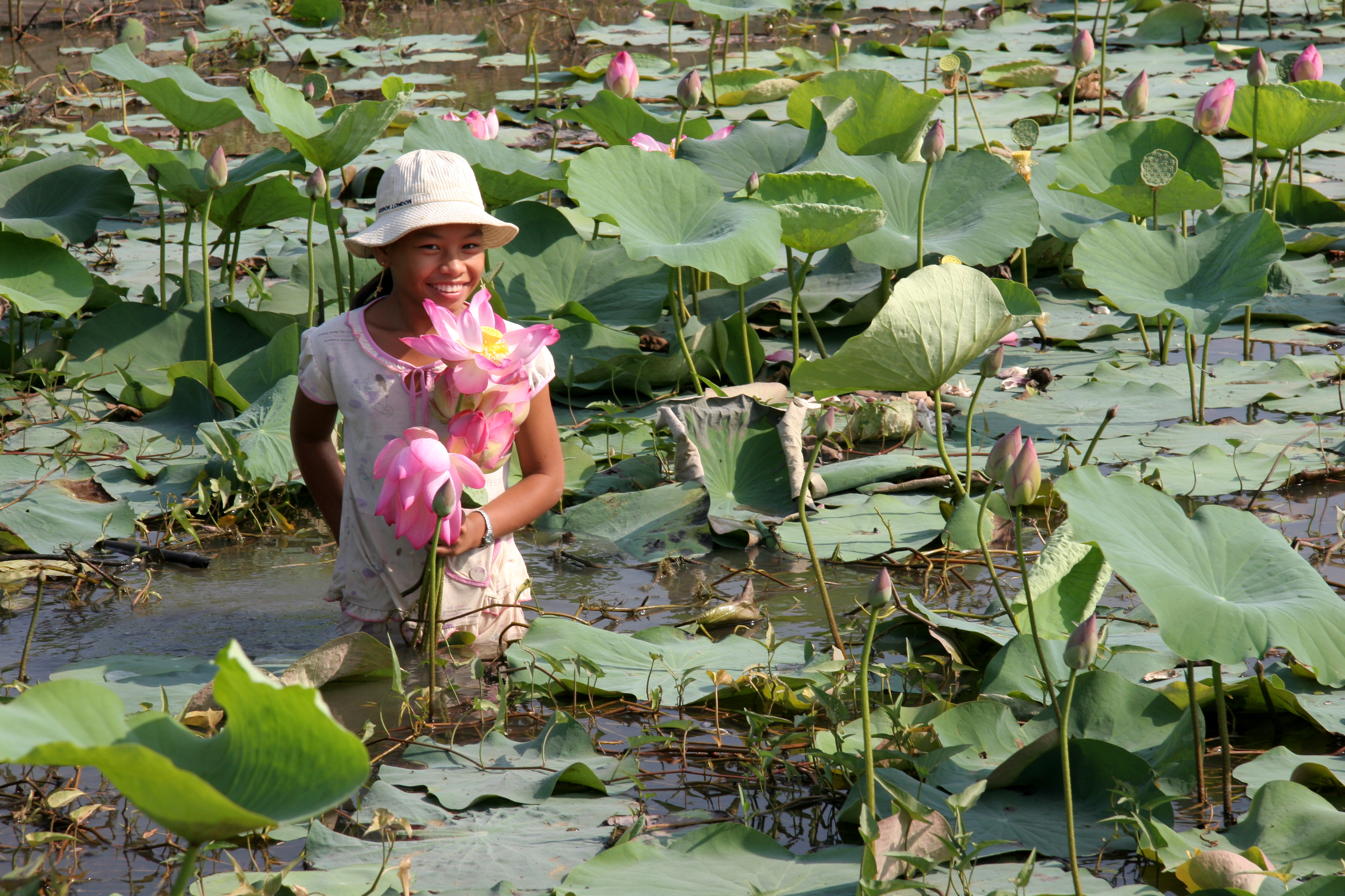 vietnam, jeune fille dans une mare avec des lotus